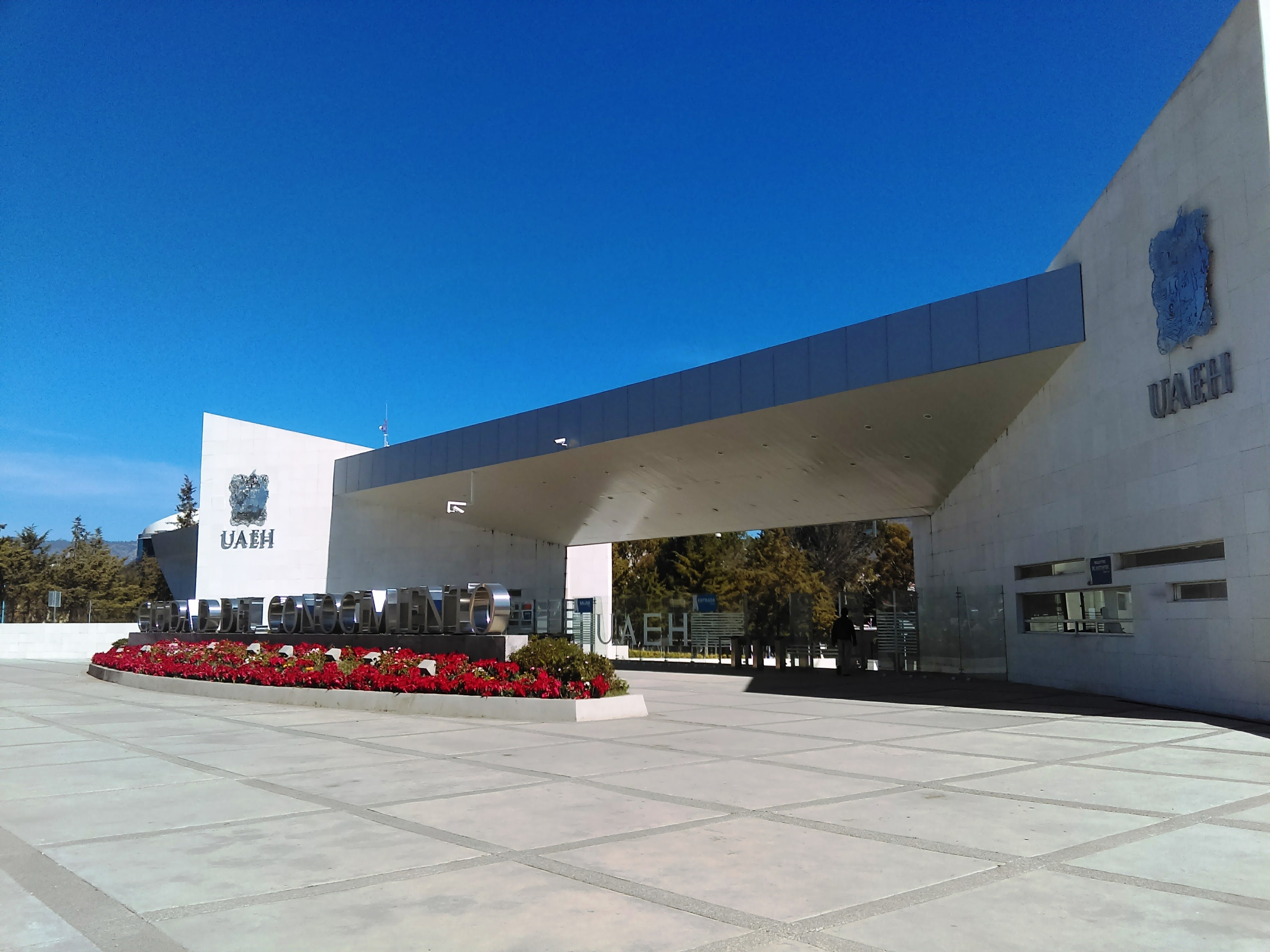 Entrada a la Ciudad del Conocimiento, UAEH.